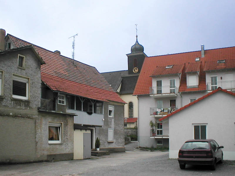 Wohnlage Burggärtenweg in der Ortsmitte von Kirchardt. Der Gewannname "Burggärten" verweist vermutlich auf die einstige Zugehörigkeit der früher hier befindlichen Gärten zur nahen Burg Steinsberg. Im Hintergrund die evangelische Kirche von Kirchardt.